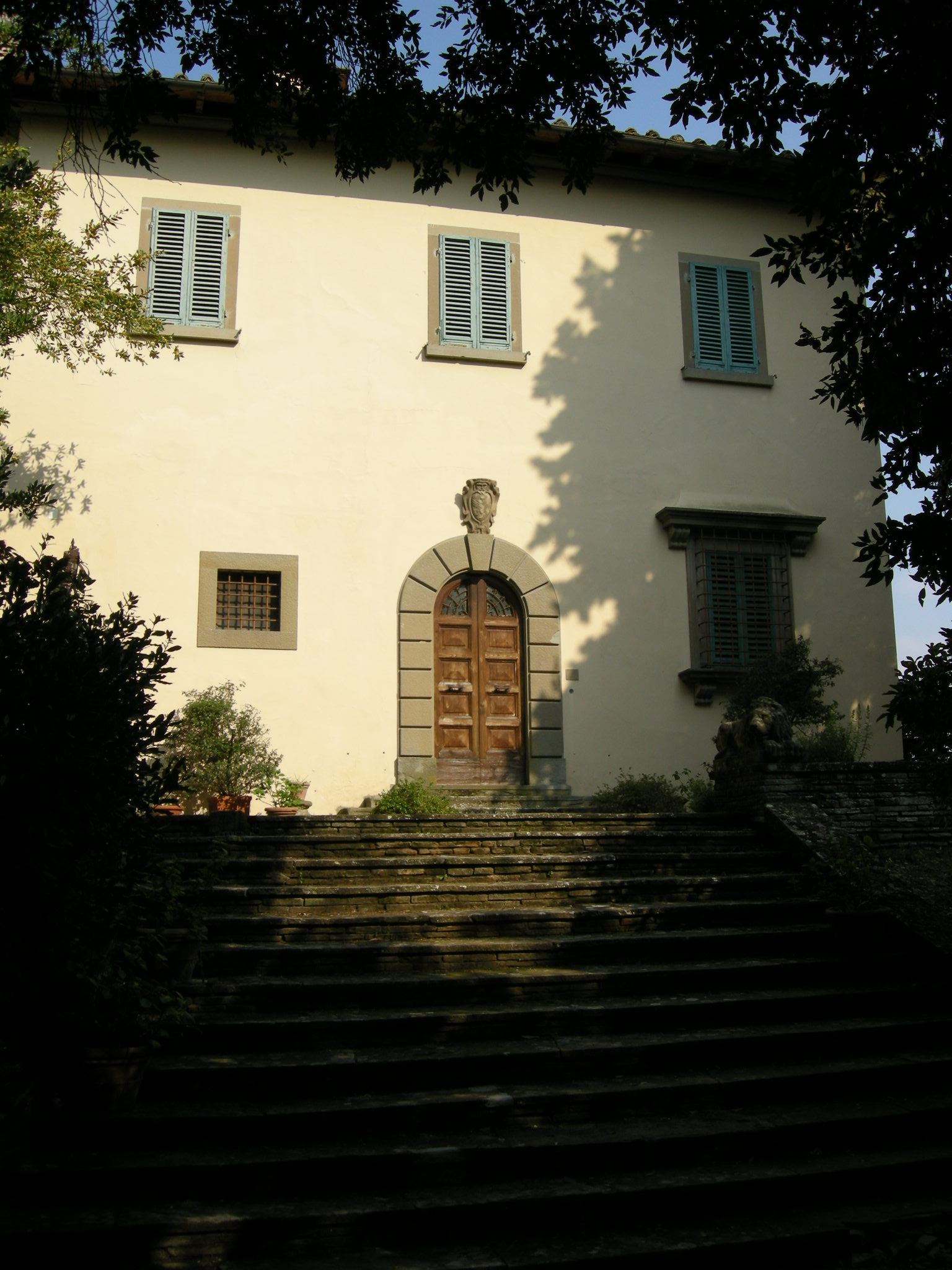 Villa il cupolino